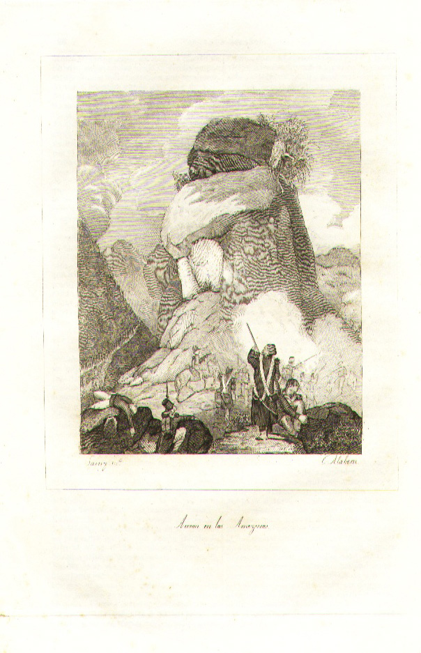 Acción de Artaza - Litografía